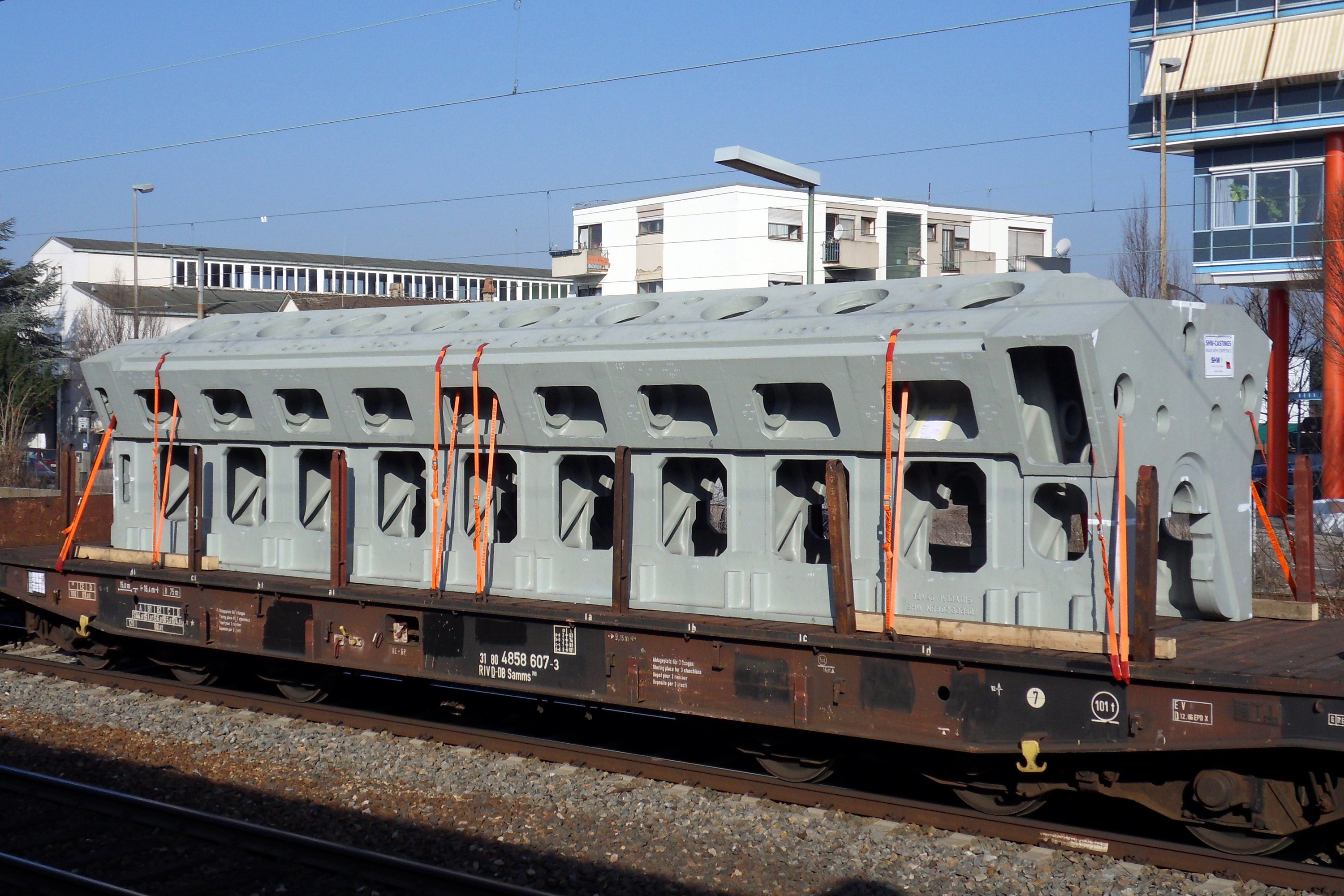 Das Zylinderkurbelgehäuse für einen Motor 18V46 steht zum Weitertransport im Bahnhof Fellbach. Material: EN-GJS-400-18U (GGG40), Abmessungen: 11.150 x 2.600 x 2.460 mm, Masse: 83 t